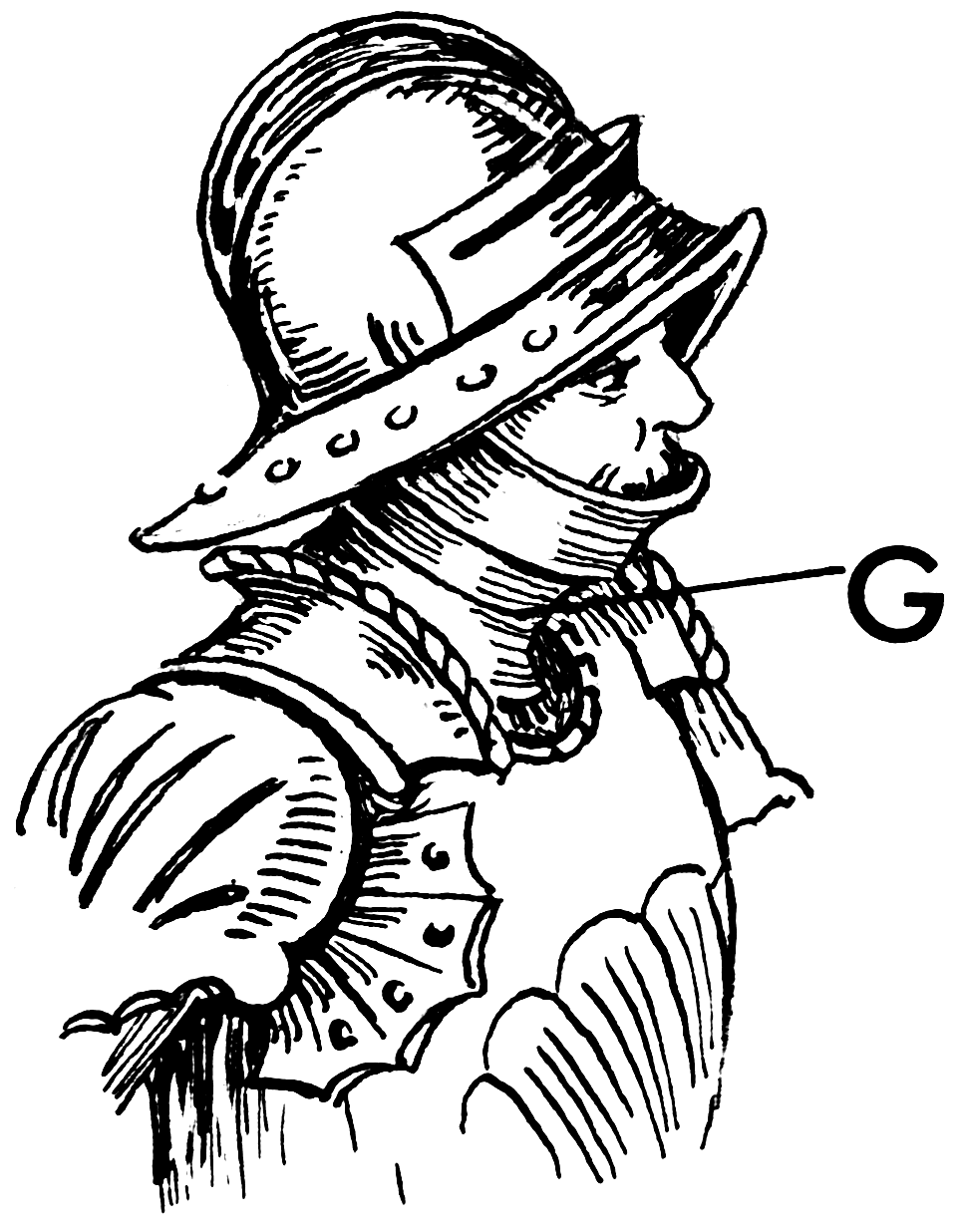 Gorget